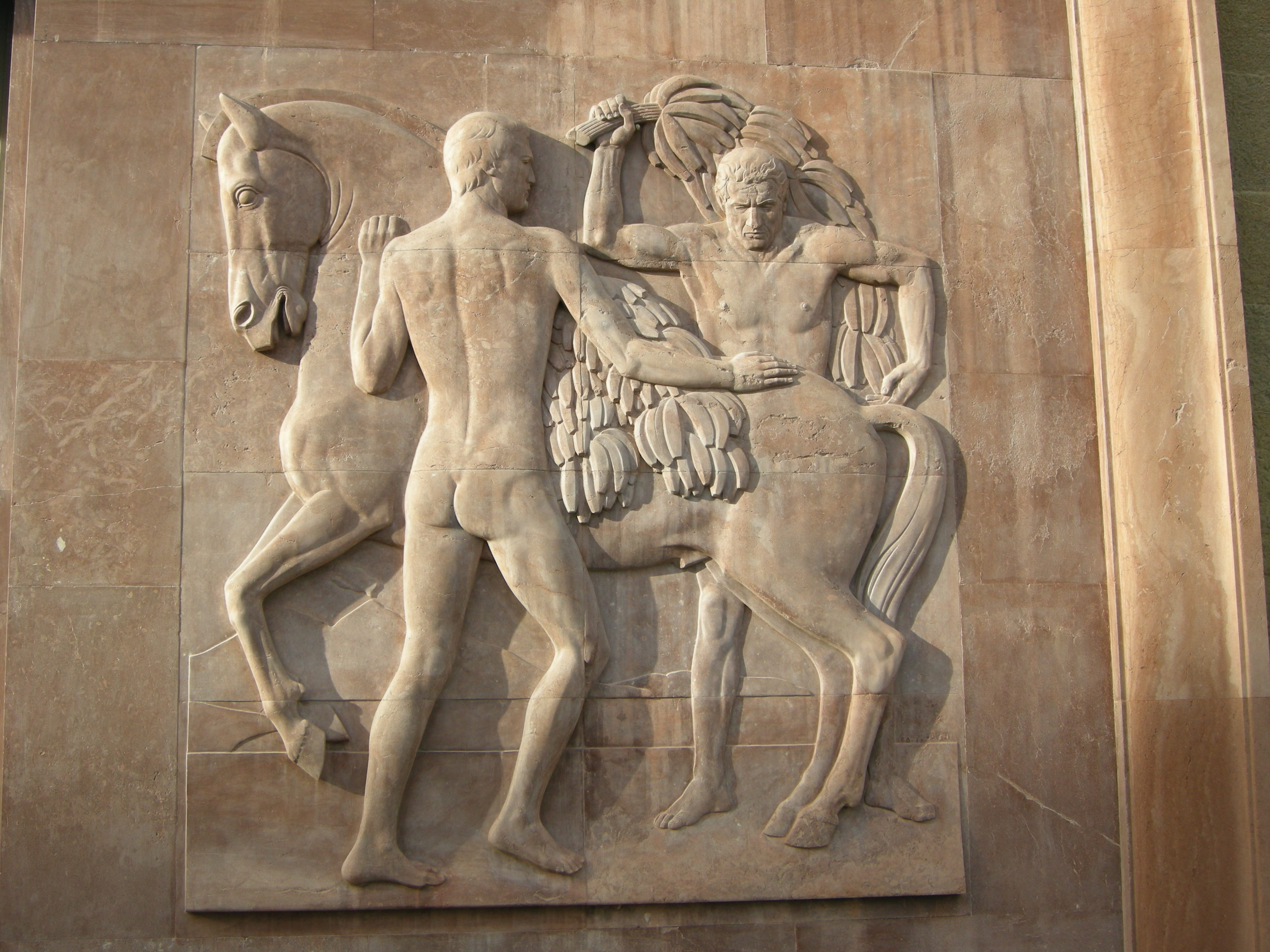 Istituto agronomico per l'oltremare